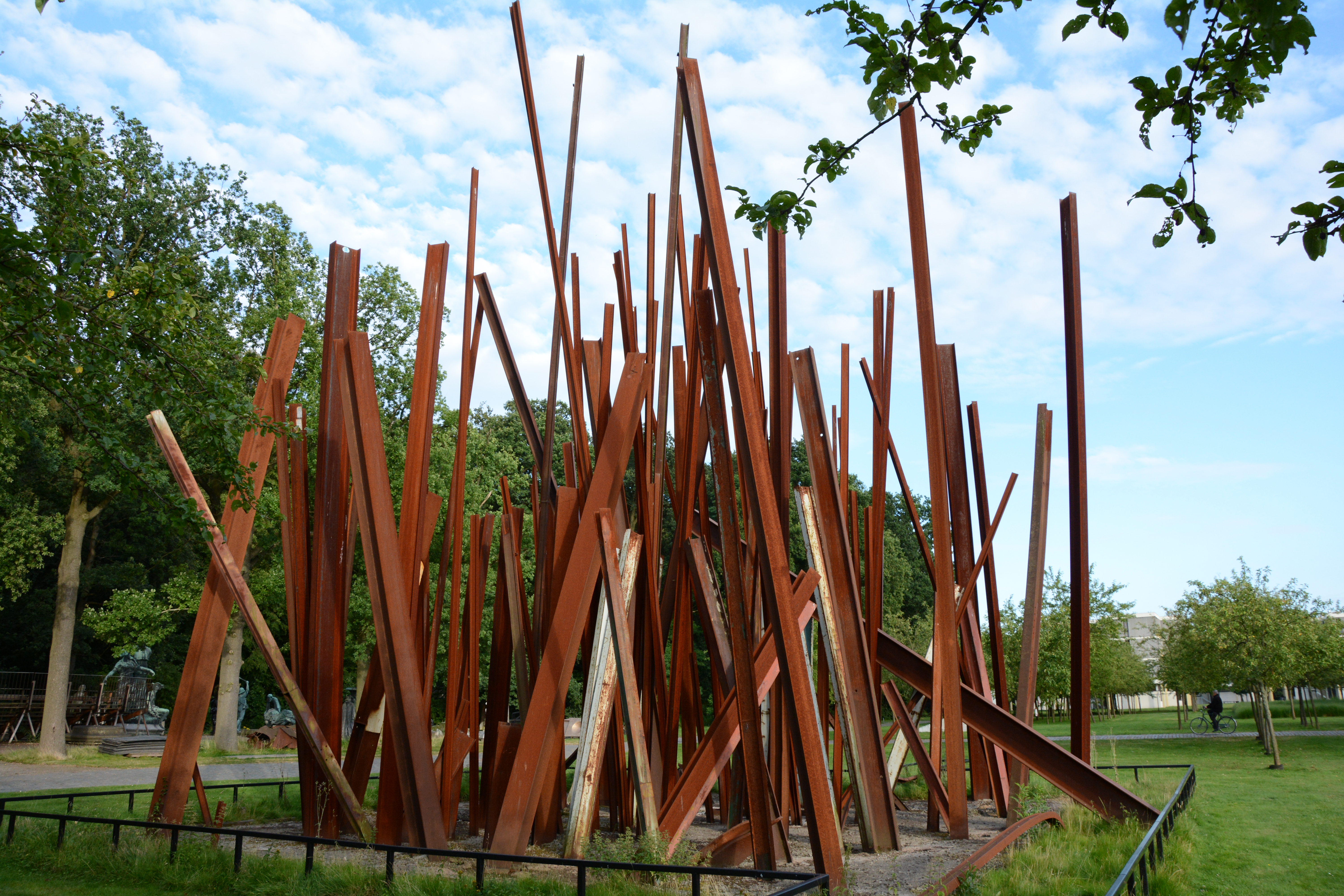 Chris Burden, Beam Drop, 2009